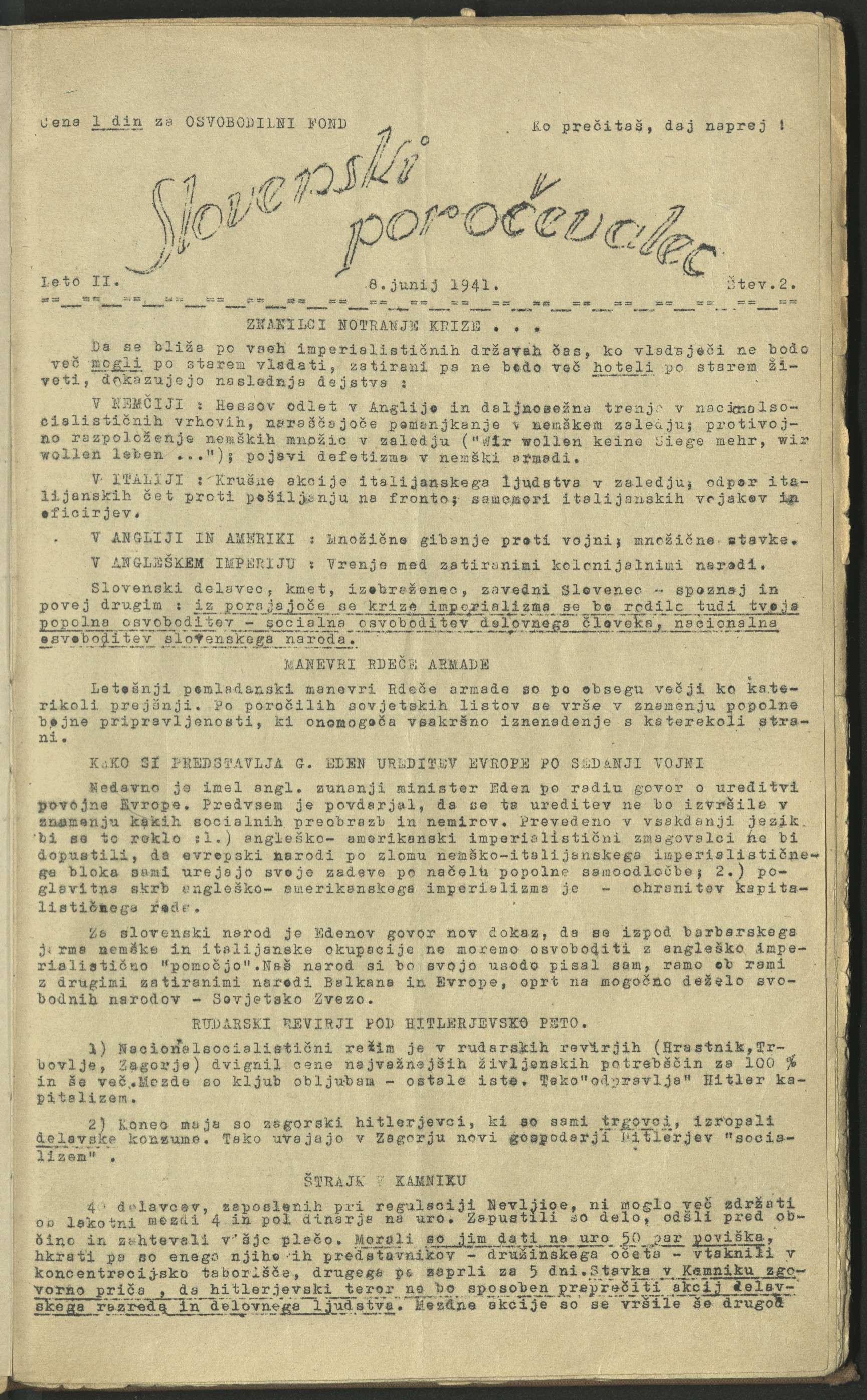 Prva stran Slovenskega poročevalca (08.06.1941), letnik 2, številka 2. URN:NBN:SI:DOC-V7BF33W2 z